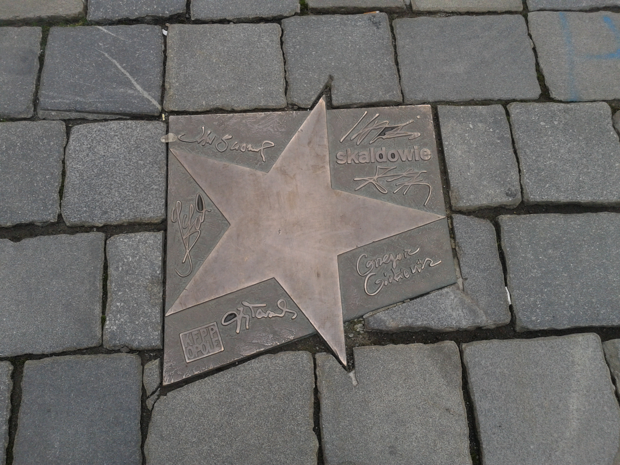 Gwiazda Skaldów w Alei Gwiazd Polskiej Piosenki w Opolu.